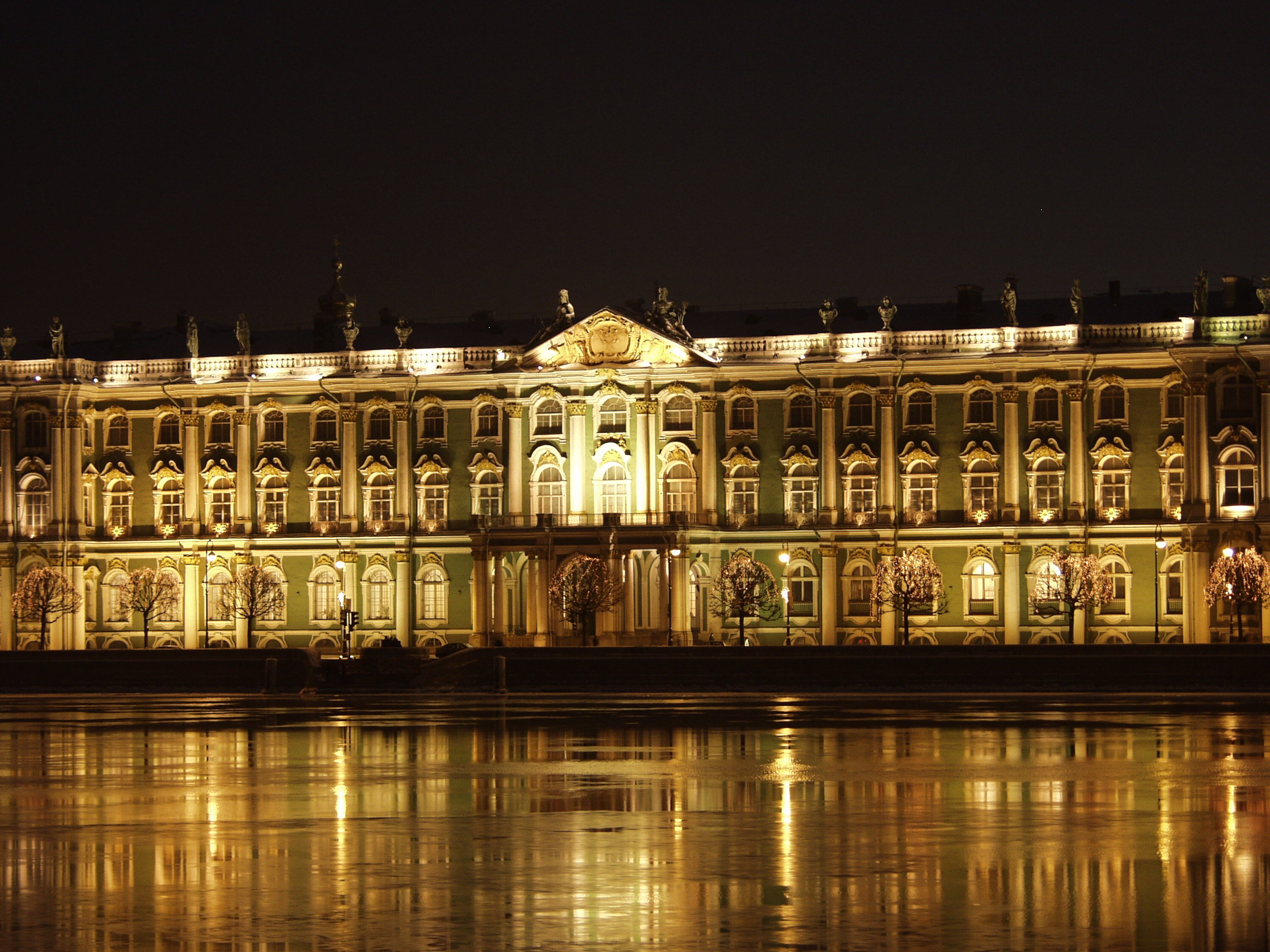 Eremitage (Sankt Petersburg) by night seen from river Newa